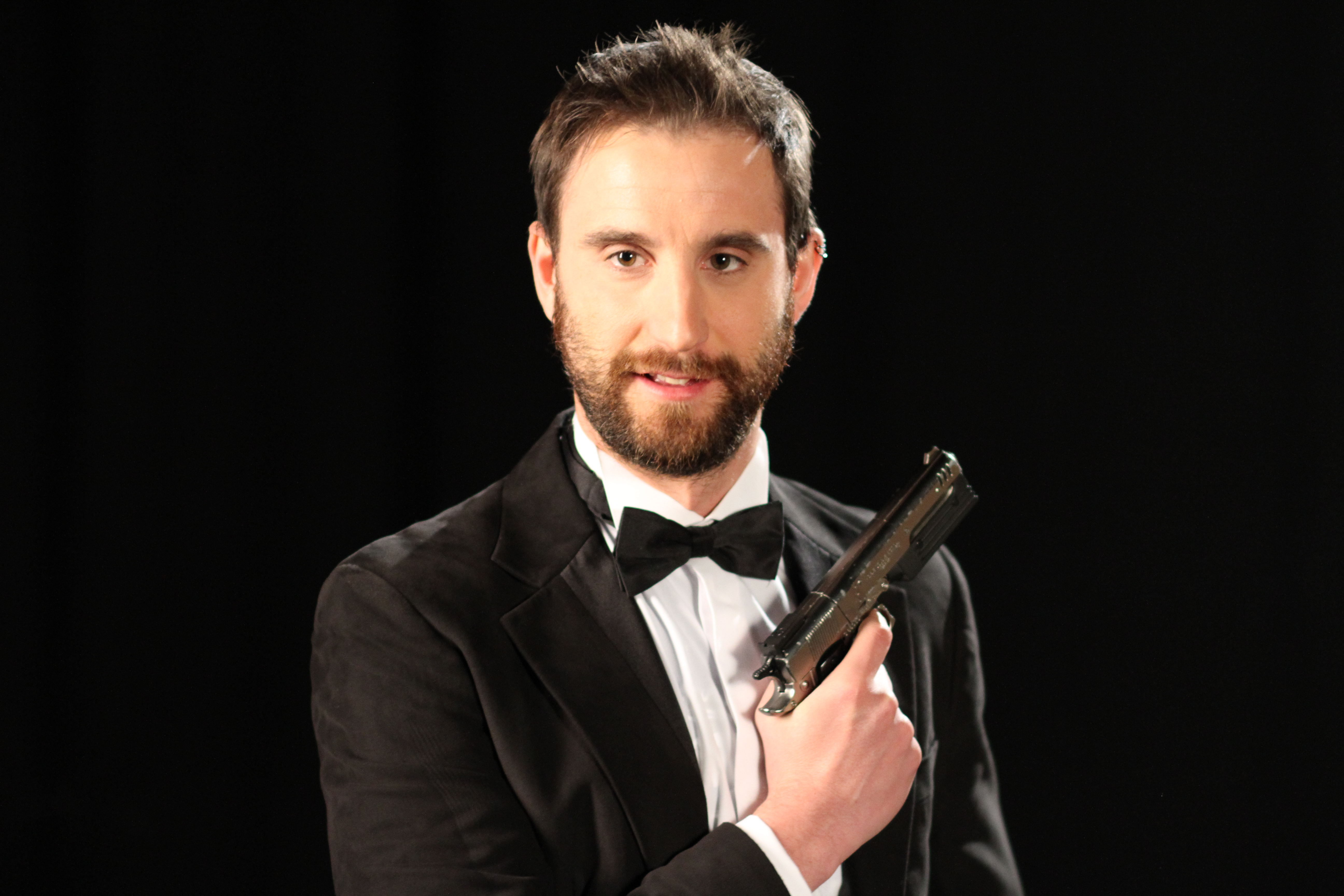 Dani Rovira en la grabación de un sketch del programa de Canal+ Óxido Nitroso en 2011